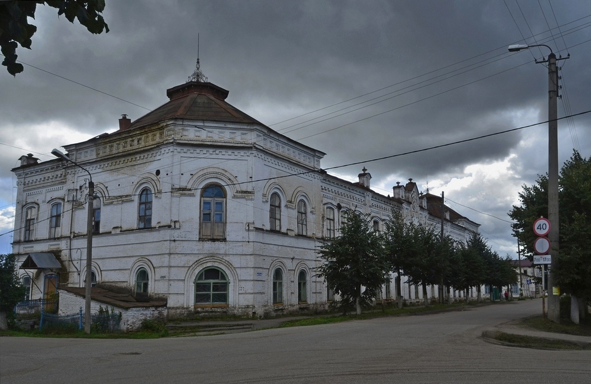 Торговые ряды г. Нолинска, бывшее здание школы №1